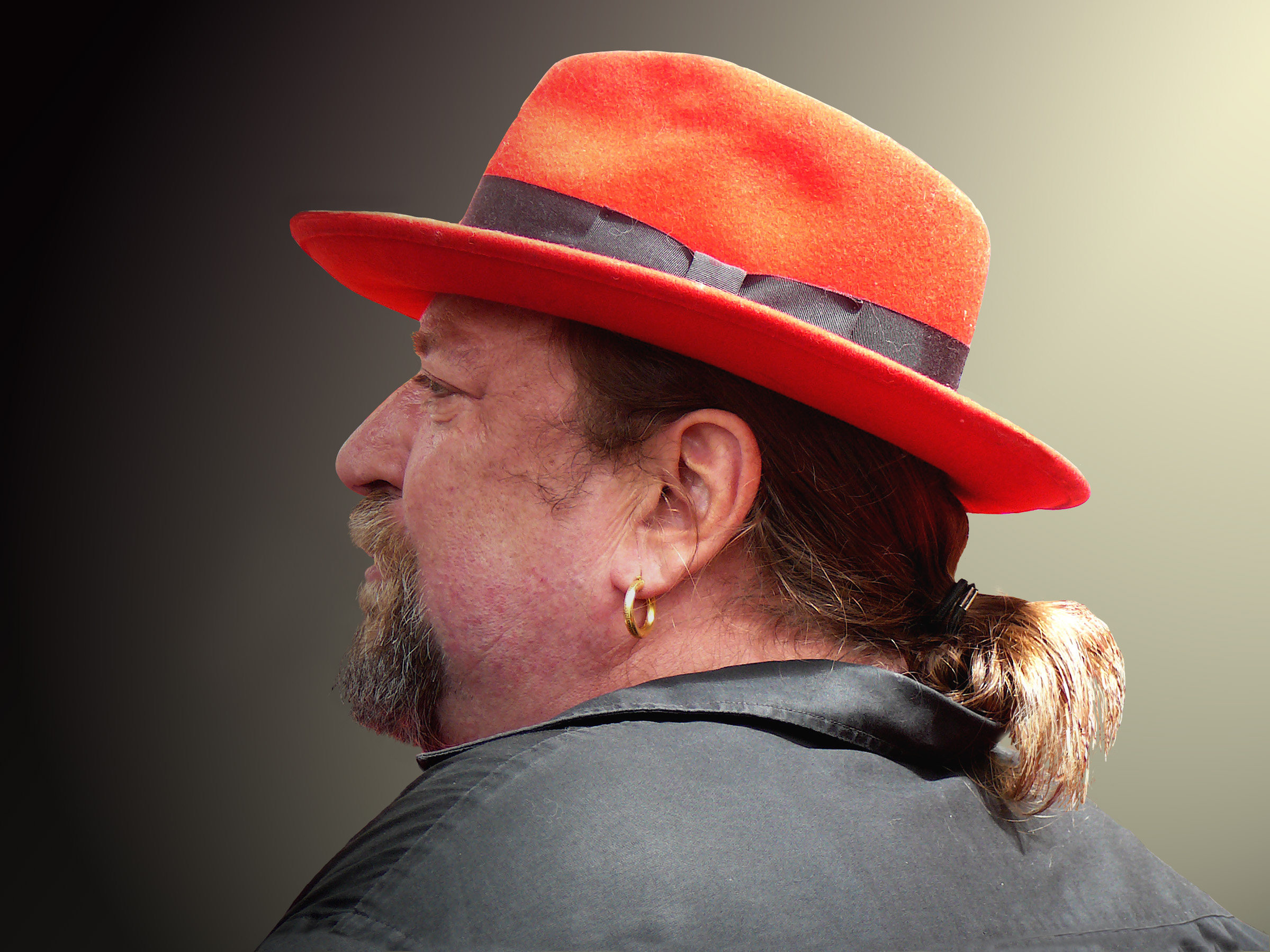 Henk Schiffmacher. Foto gemaakt op zondag 13 juli 2008 film première bij Pathé Buitenhof in Den Haag. De Brief voor de Koning, de verfilming van het boek van" Tonke Dragt ".,Cast en crew waren aanwezig bij de speciale vertoning . Archeon verzorgd de Middeleeuwse sfeer bij de premiere met Ridders en Jonkvrouwen. Reinout Oerlemans (producent, gastheer